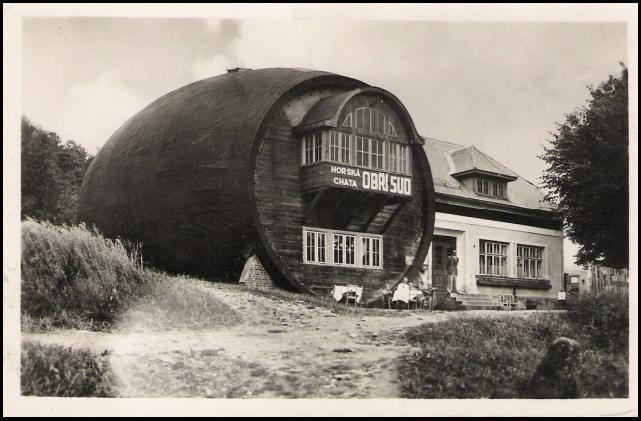 Pohled na restauraci Obří sud. Fotografie snad z roku 1935.